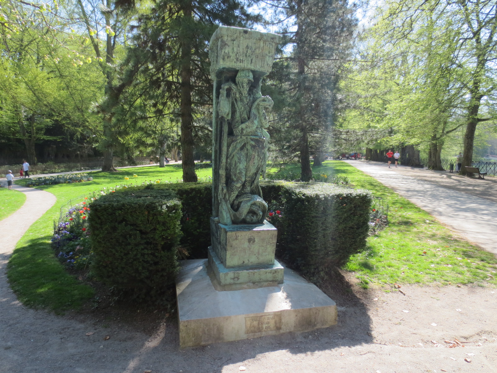 Parc Micaud